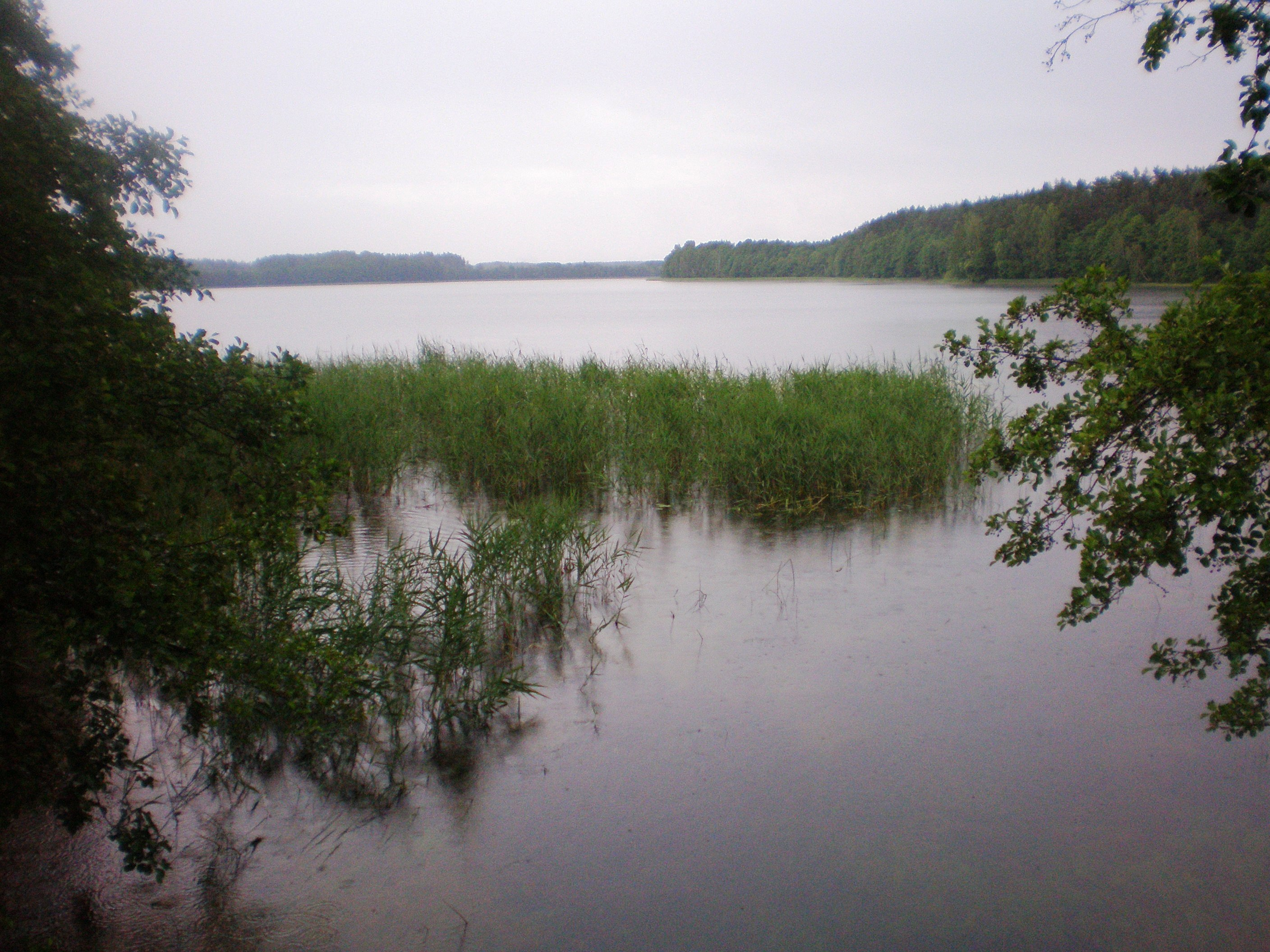 Šakarvai lake near Šakarva village in Lithuania